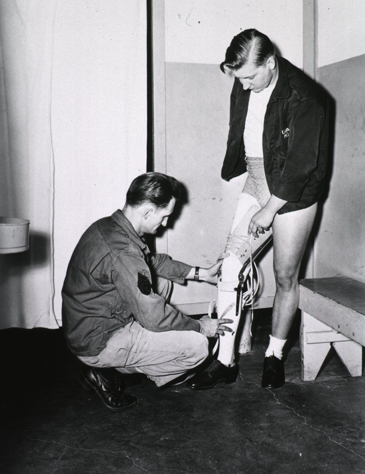 an amputee